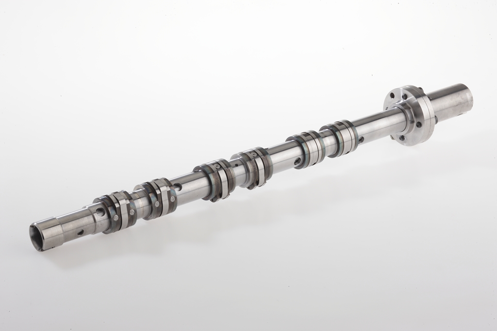 Concentric Cam Typ II